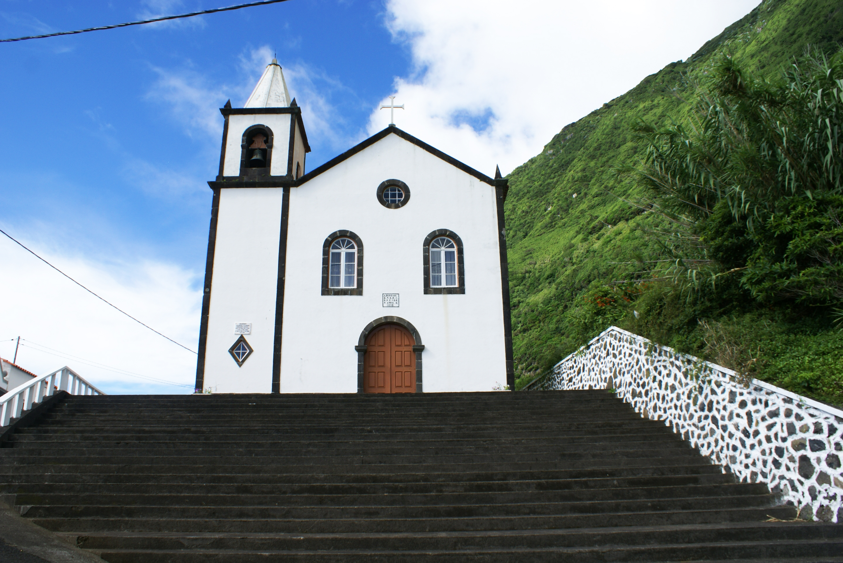 Ermida da Ponta da Fajã Grande, ilha das Flores, Açores, Arquivo de Villa Maria, ilha Terceira, Açores